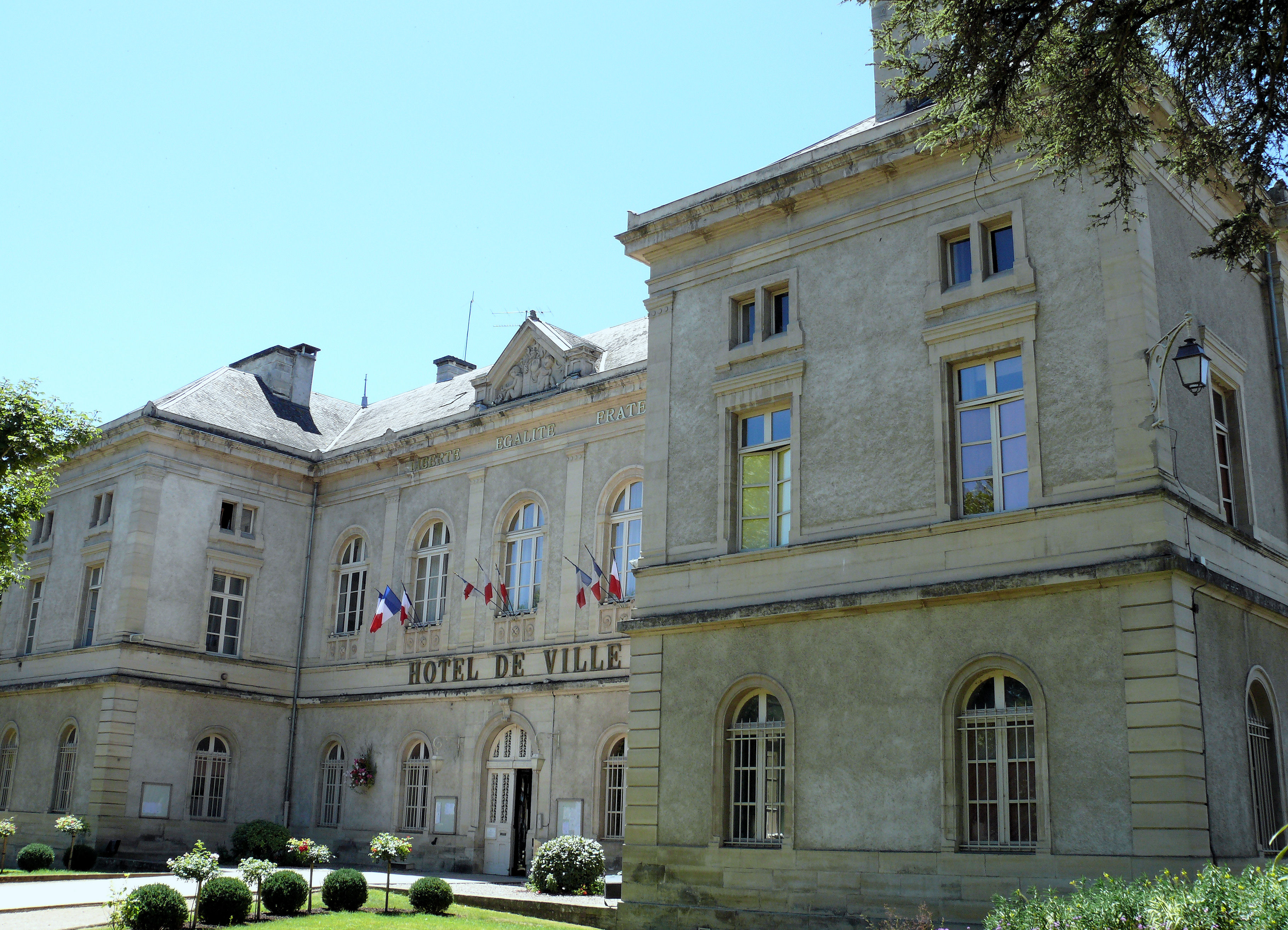 Villefranche-de-Rouergue - Hôtel de ville